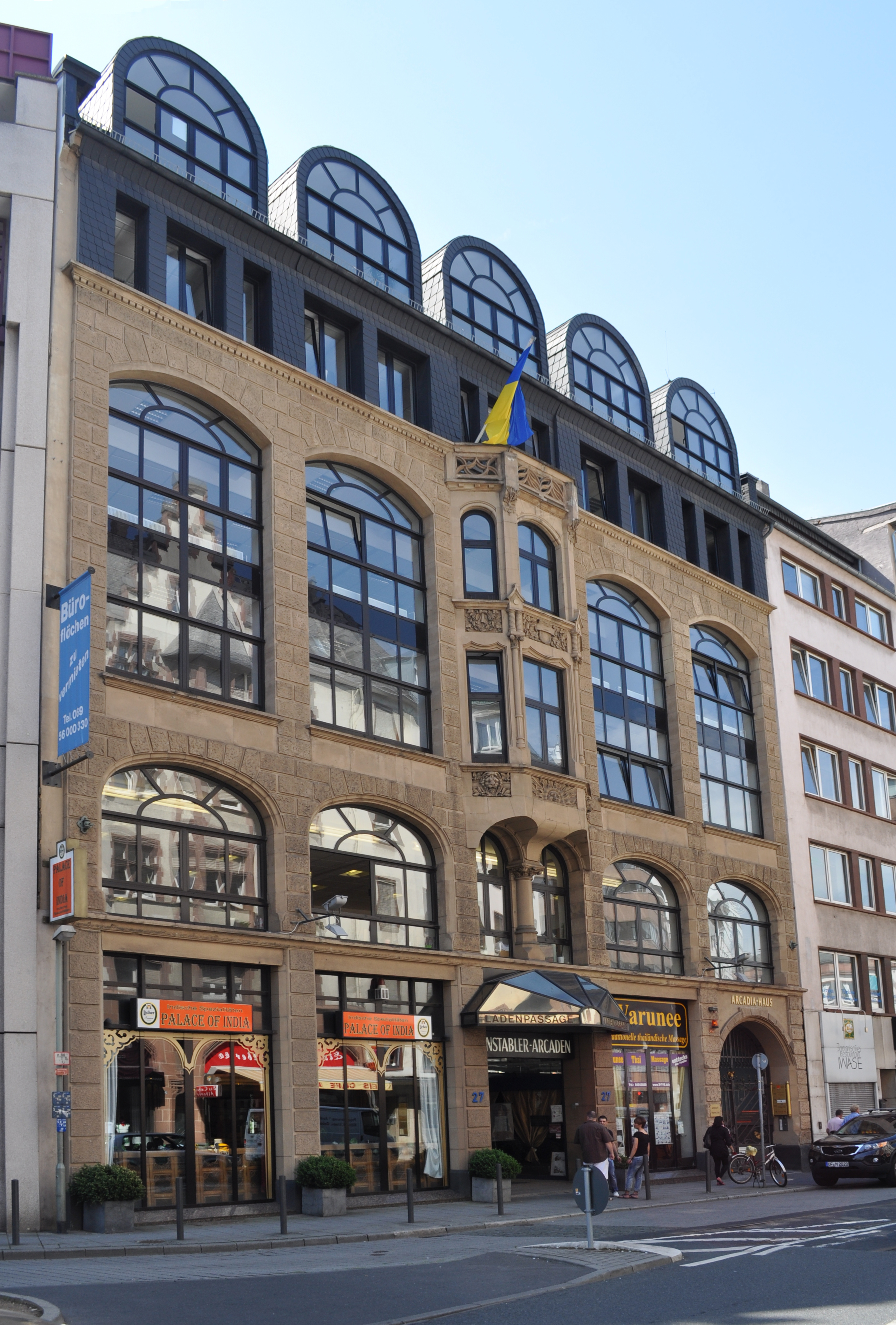 Frankfurt, Vilbeler Straße 29, Sitz des ukrainischen Generalkonsulates in Frankfurt